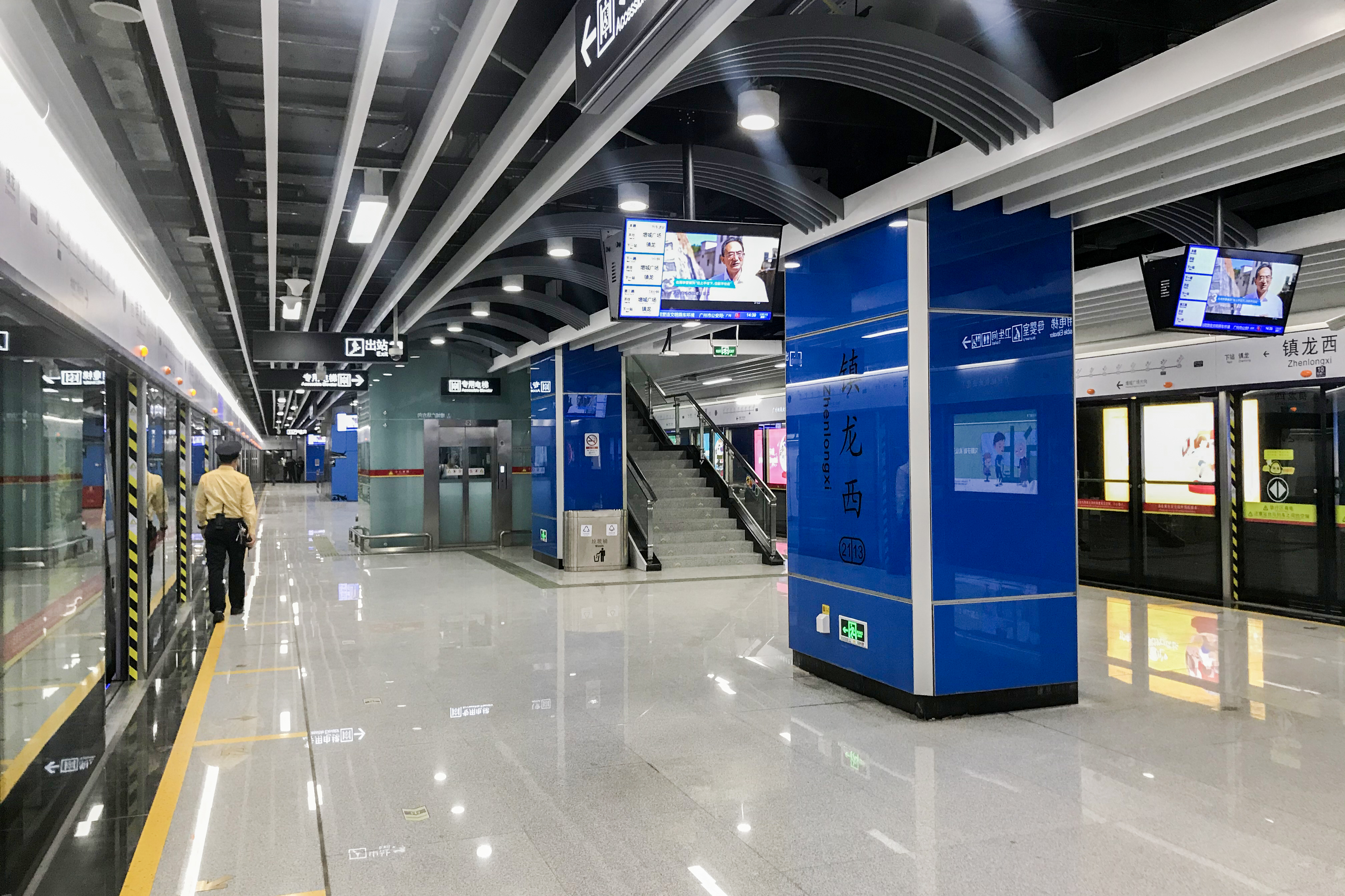 广州地铁镇龙西站